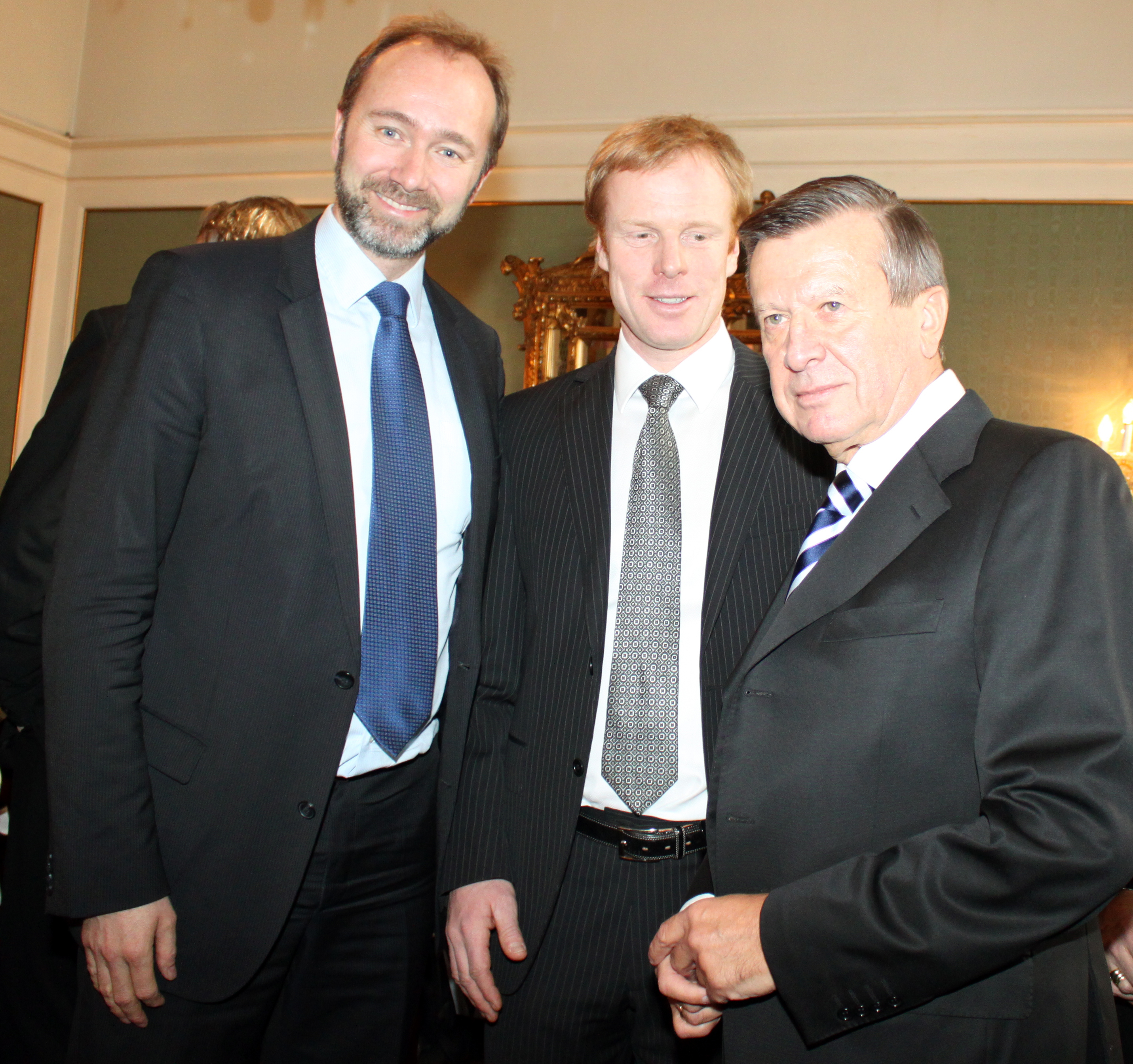 Trond Giske, Bjørn Dæhlie og Viktor Zubkov